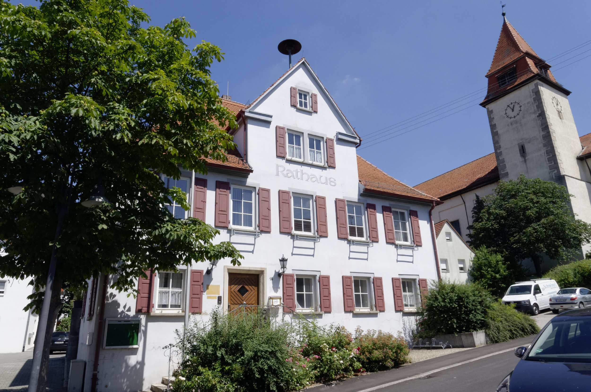 Bilder aus Wurmlingen 2016